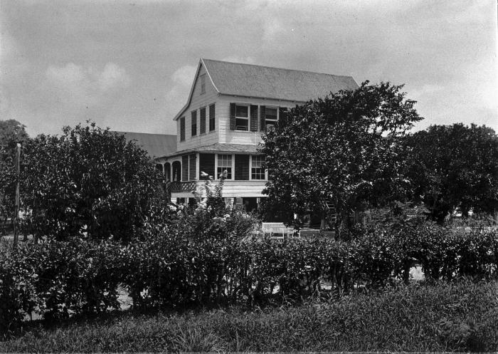 Foto. Zorgvliet aan de Commewijnerivier